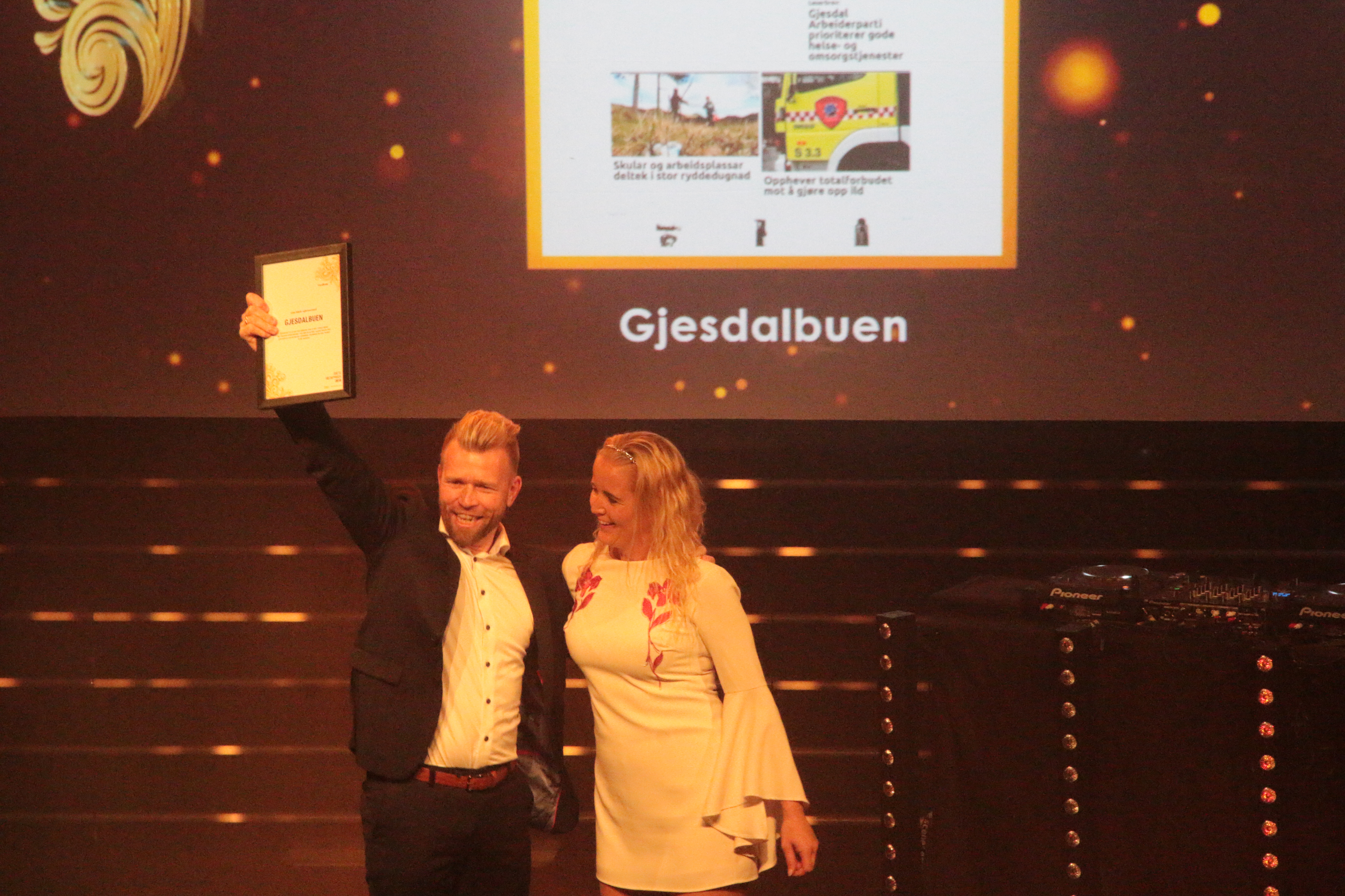 Medvirkende: Nominerte fra ulike Mediehus